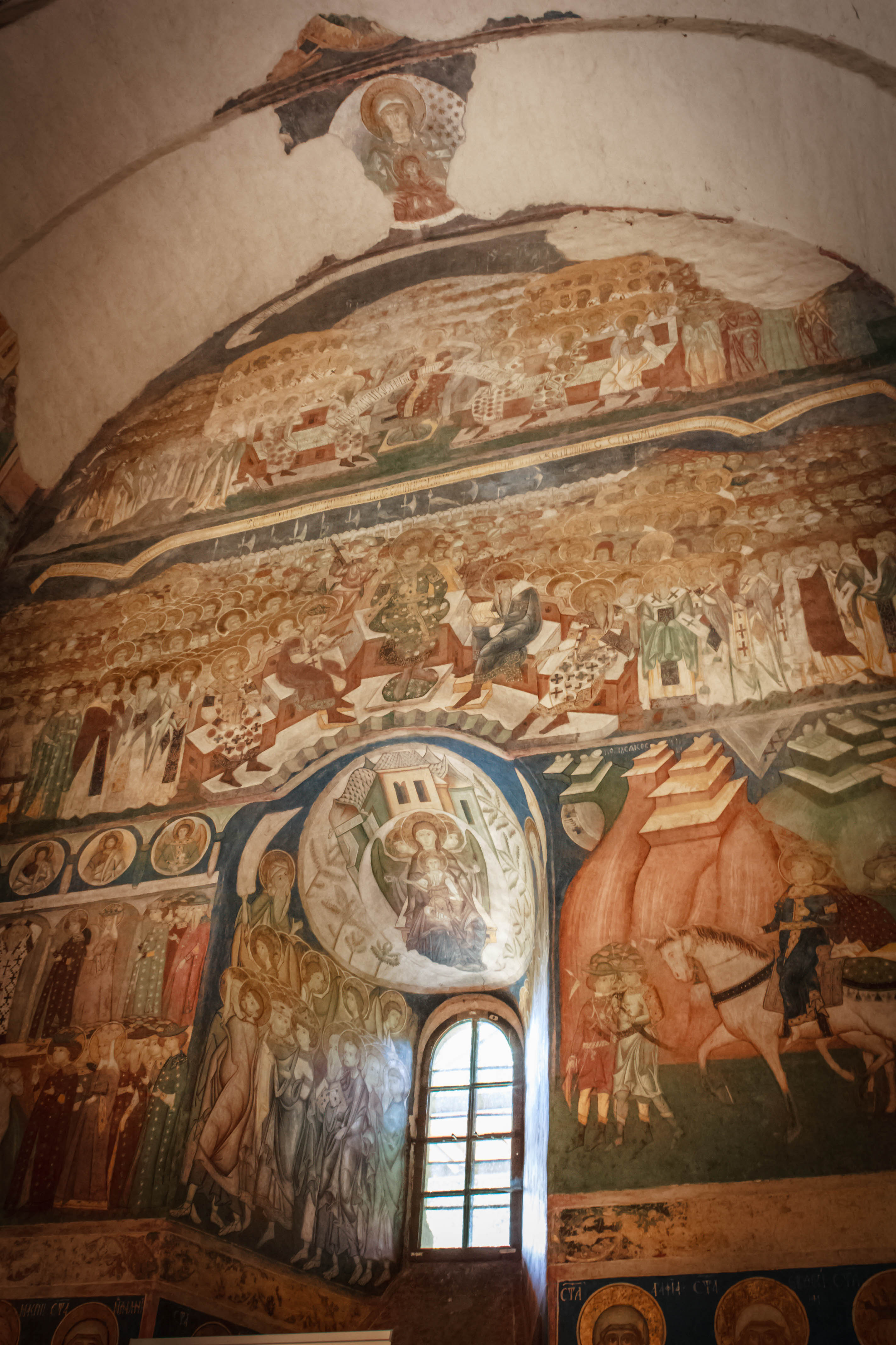 Biserica Tăierea Capului Sfântului Ioan Botezătorul din Arbore, județul Suceava, România.